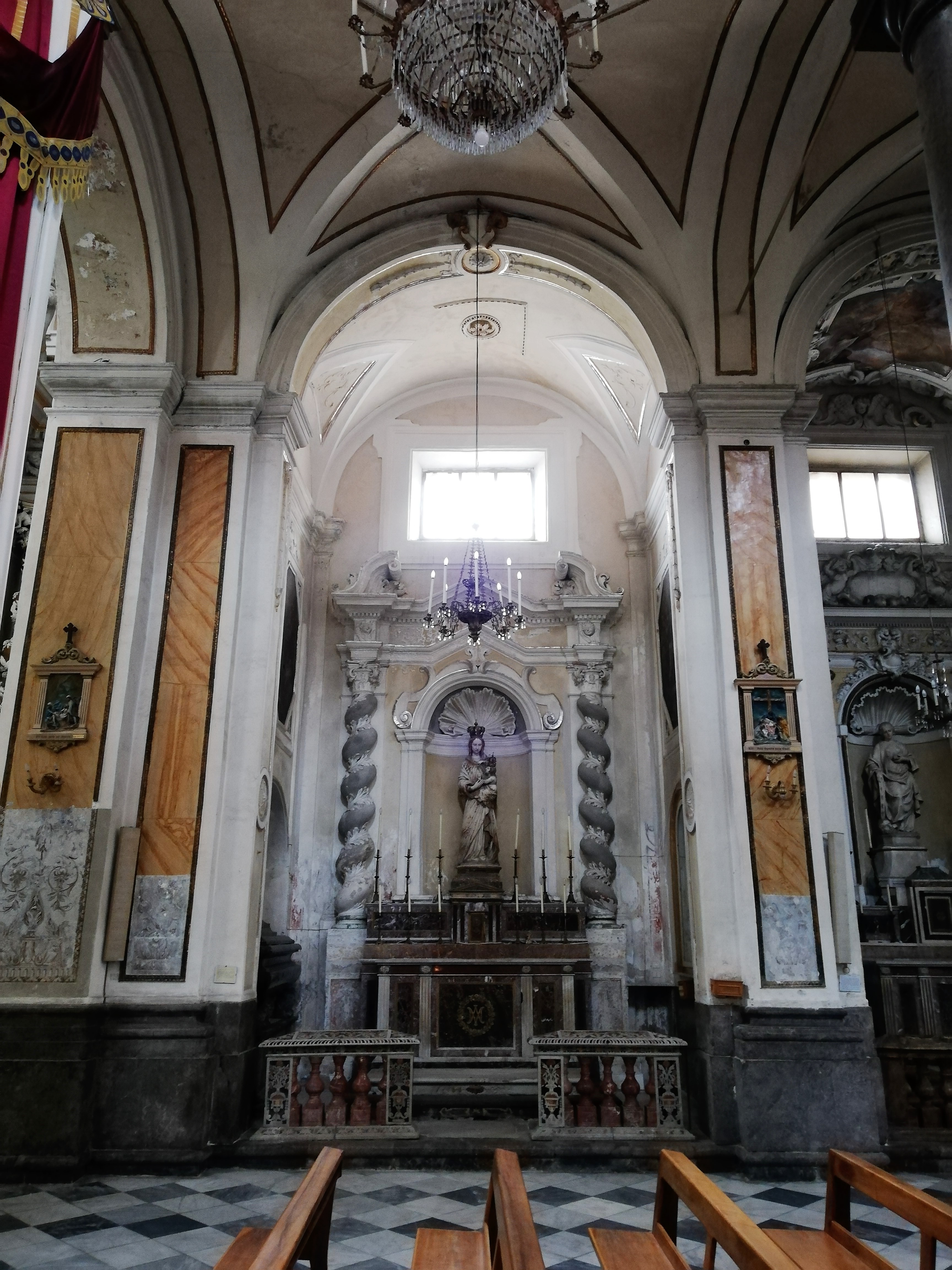 Quinta cappella navata destra.